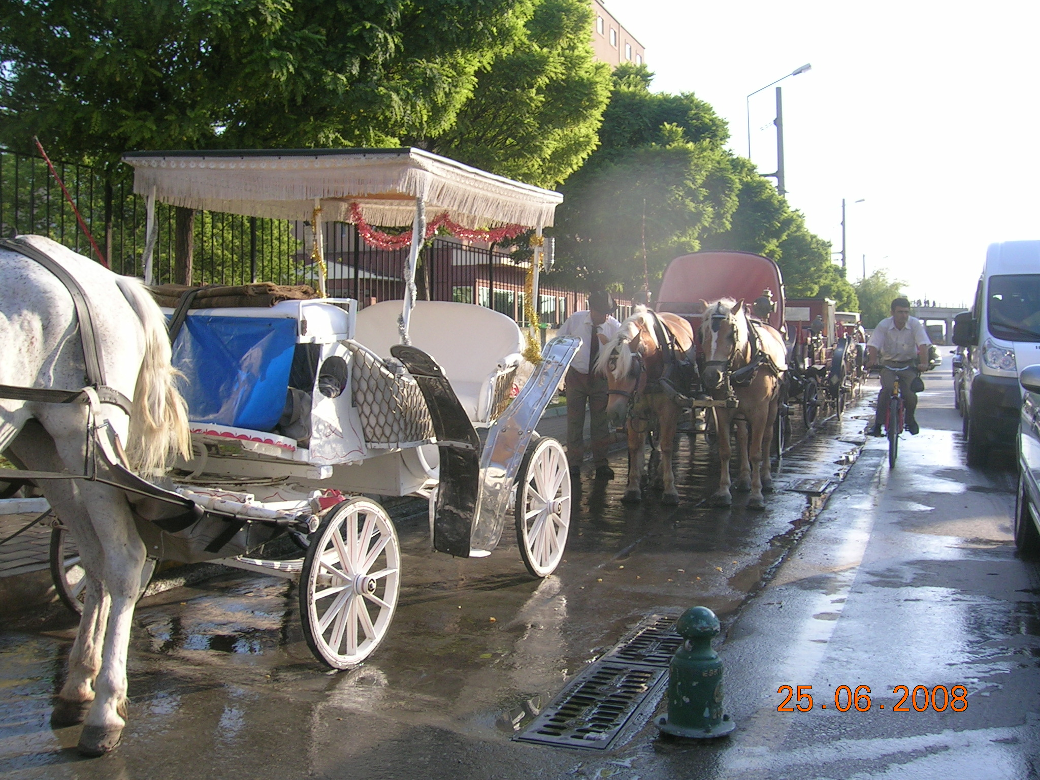 Fayton istasyonu, Haller Gençlik Merkezi Önü, Eskişehir, Türkiye